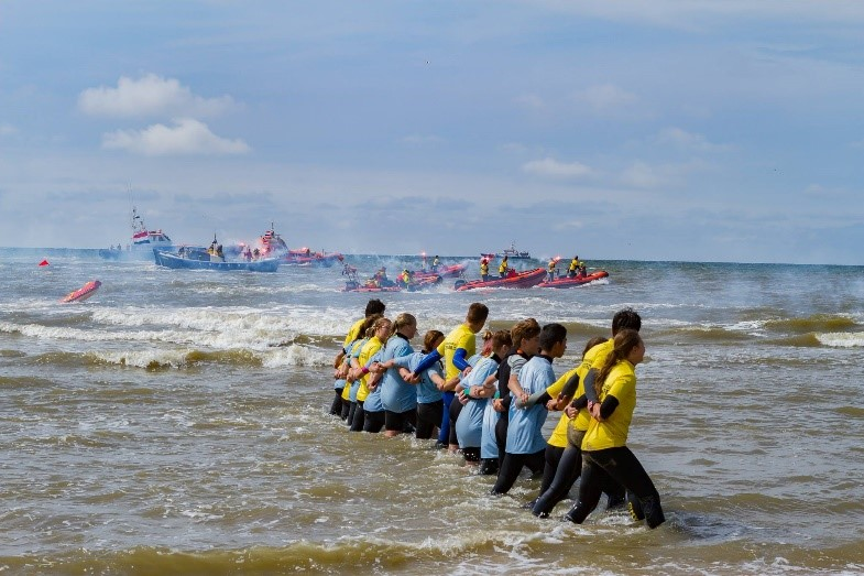 Demonstratie tijdens SAR Katwijk 2018